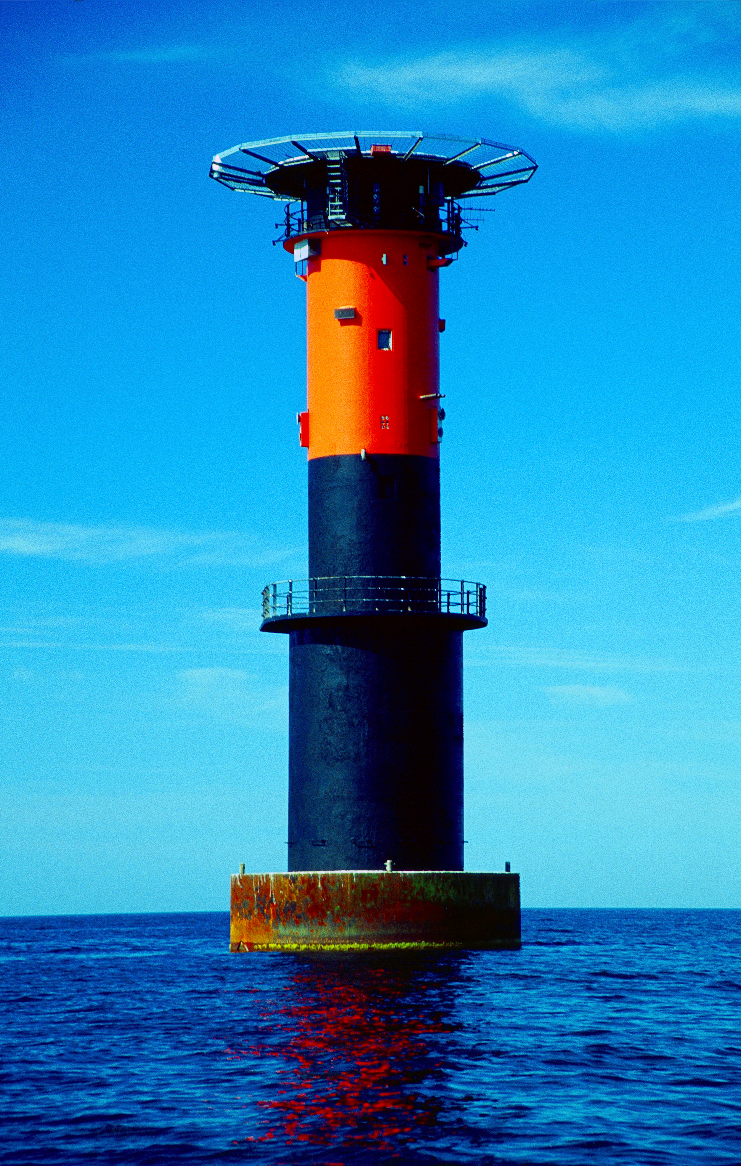 Fyren Almagrunder sommaren 2002. Då lyste fyren fortfarande med sealbeamlampor, och inte som nu, men LED belysning ovanpå helikopterplattformen